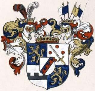 Delwigi suguvõsa vabahärravapp